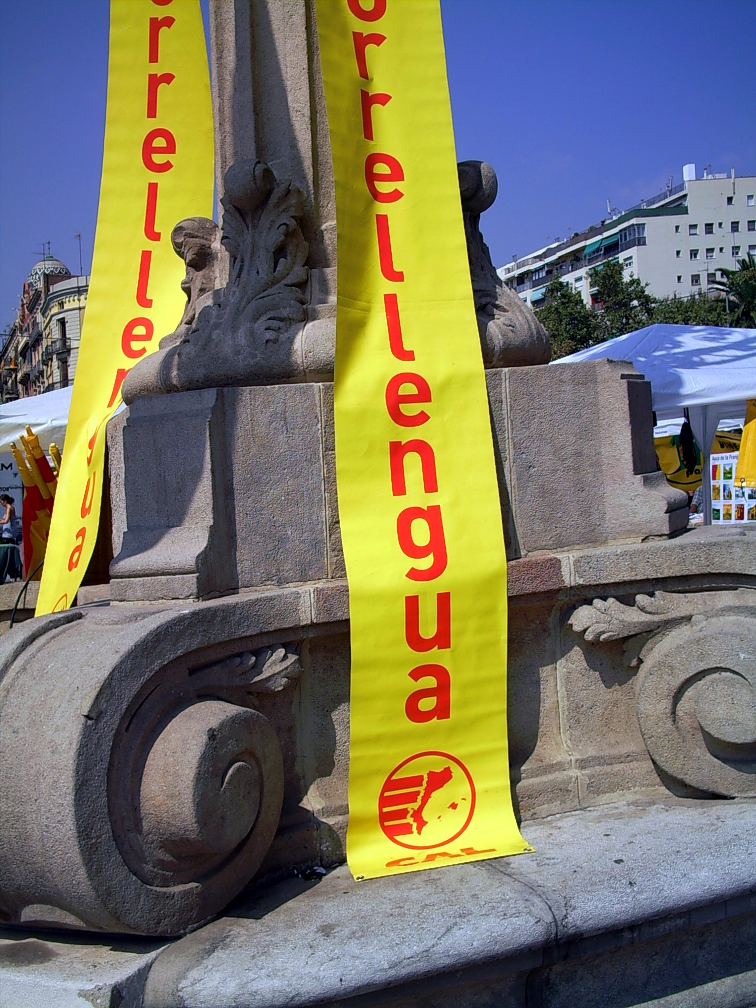 Pancarta del Correllengua, a l'Arc de Triomf de Barcelona, (Catalunya), la Diada, de 2007.